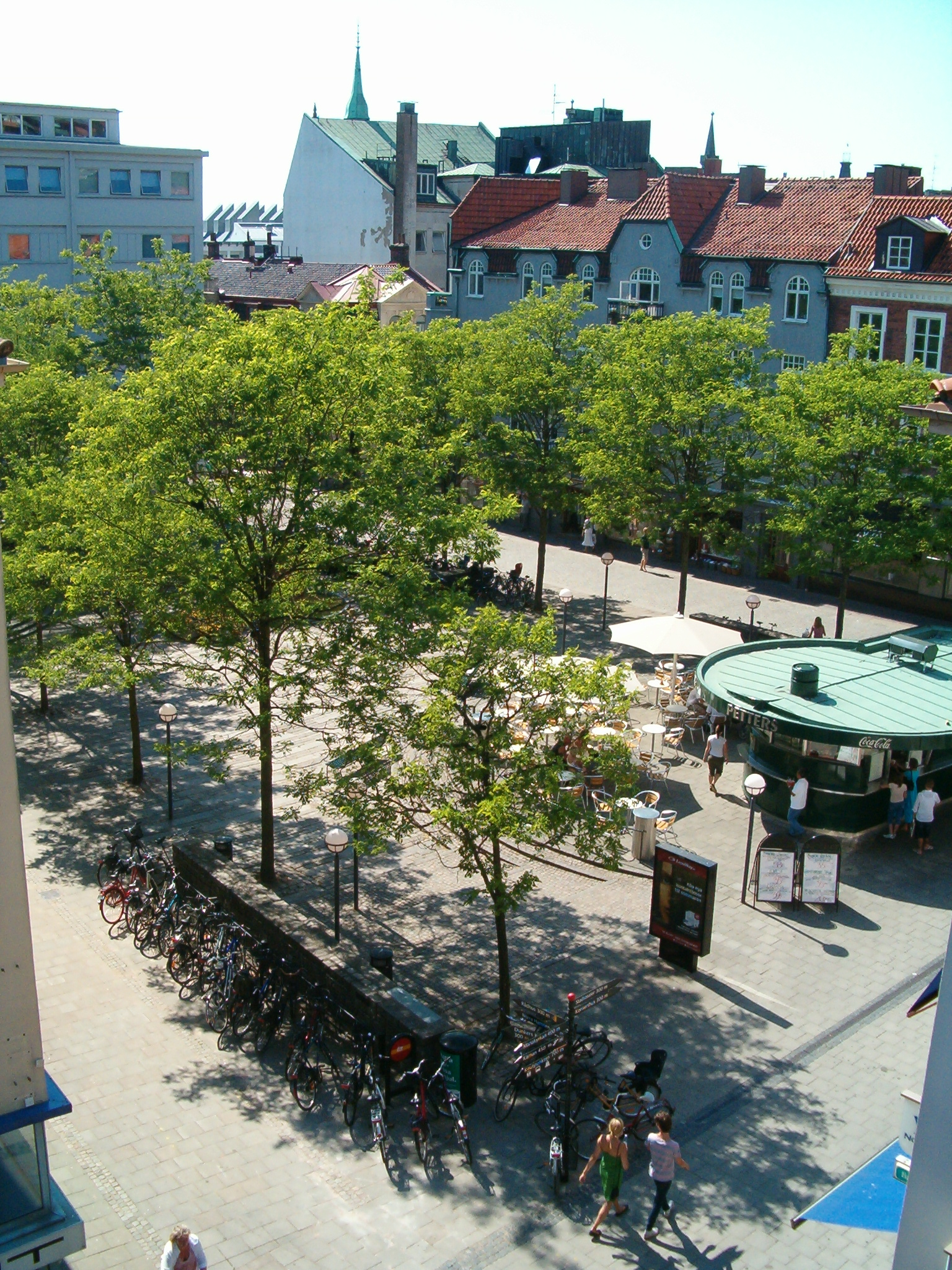 Konsul Olsson plats in Helsingborg, Sweden